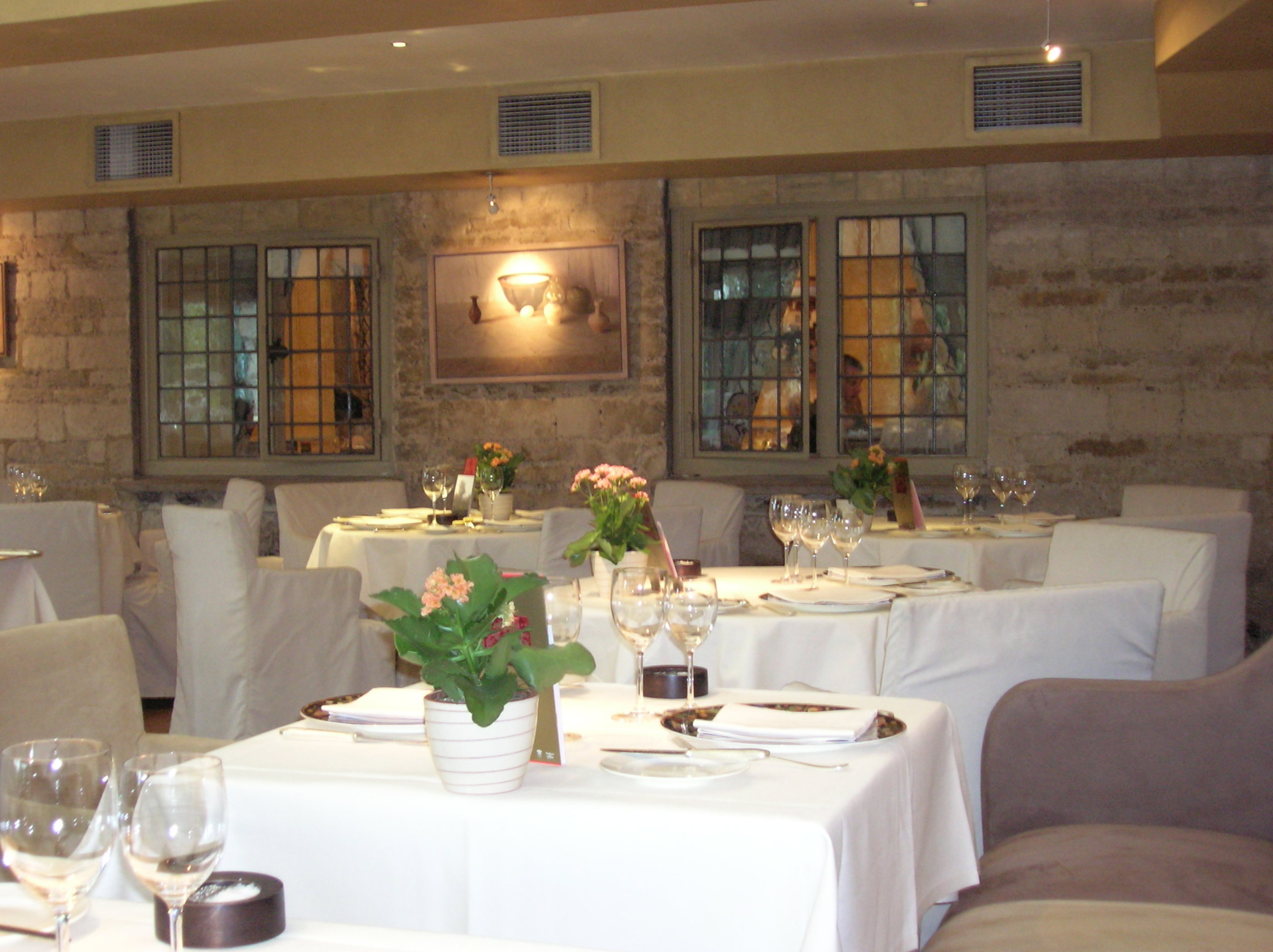 לה מנואר או קואט סזון